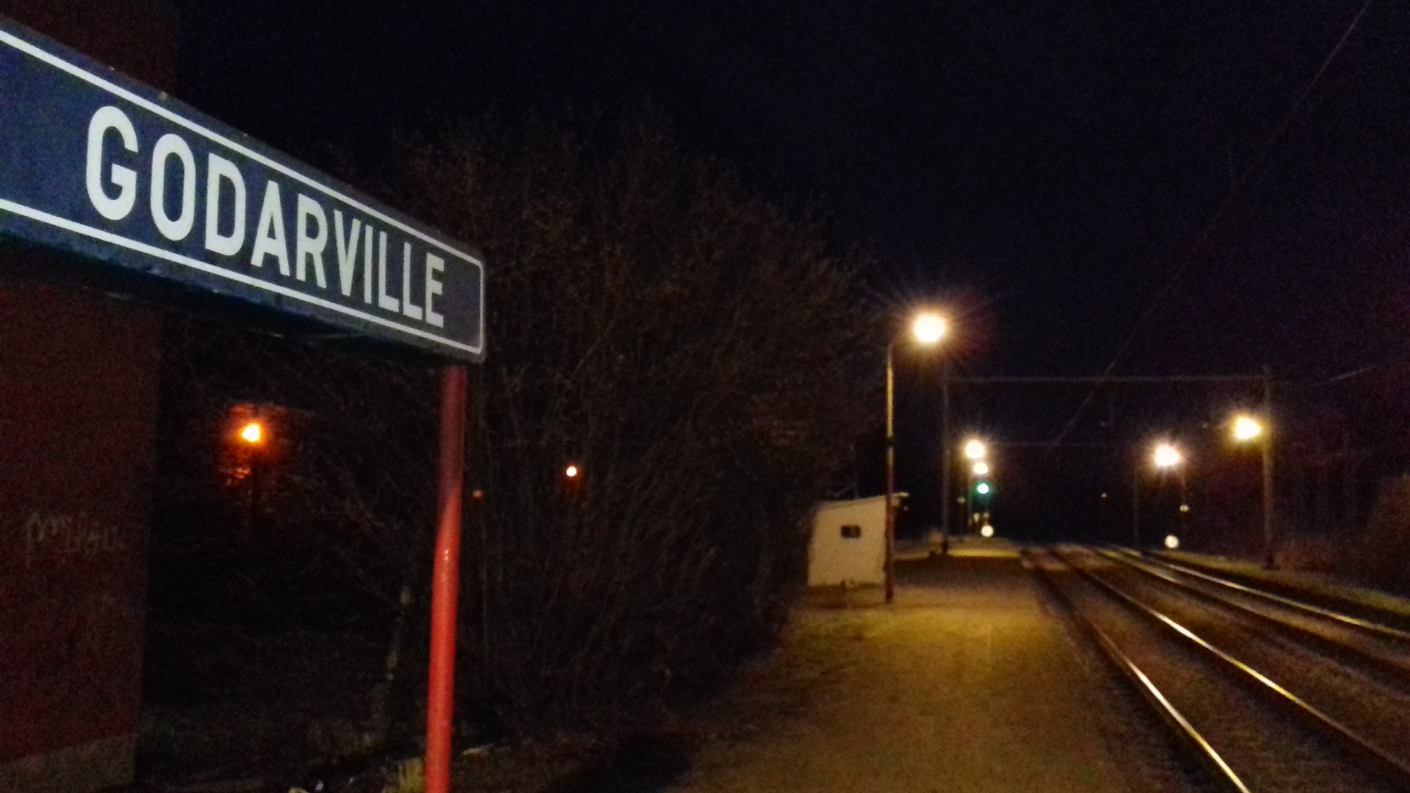 Gare de Godarville